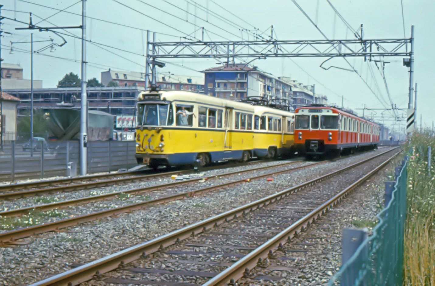 I binari delle linee celeri dell'Adda lungo via Palmanova a Milano. L'immagine è stata scattata poco a sud della stazione di Crescenzago. Sulla sinistra un convoglio tranviario bloccato serie 800, utilizzato per il servizio fra Milano (Sire Raul) e Gorgonzola; sulla destra un treno metropolitano della linea 1, utilizzato provvisoriamente sulla linea 2, fra Centrale e Cascina Gobba.